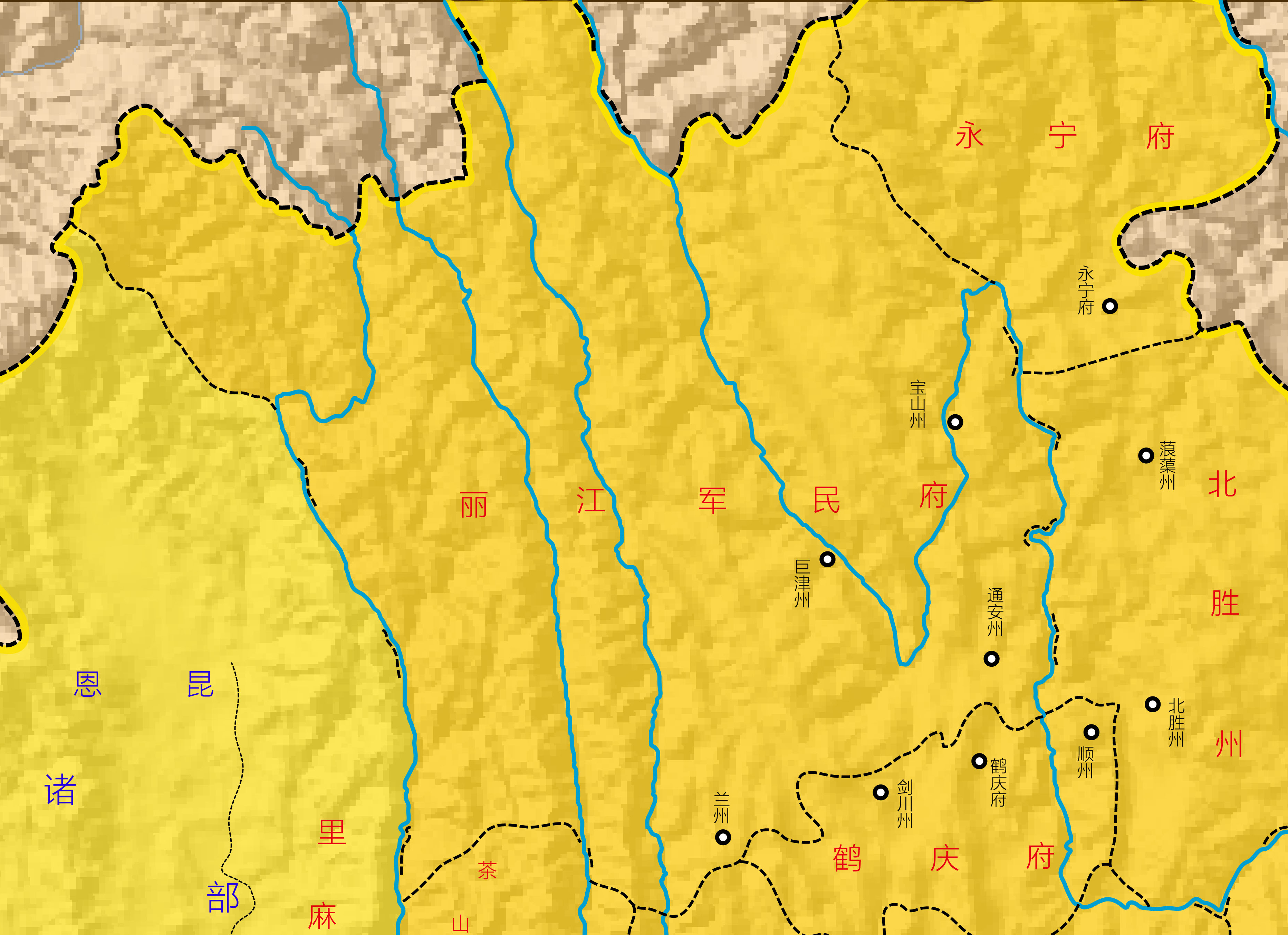 丽江府